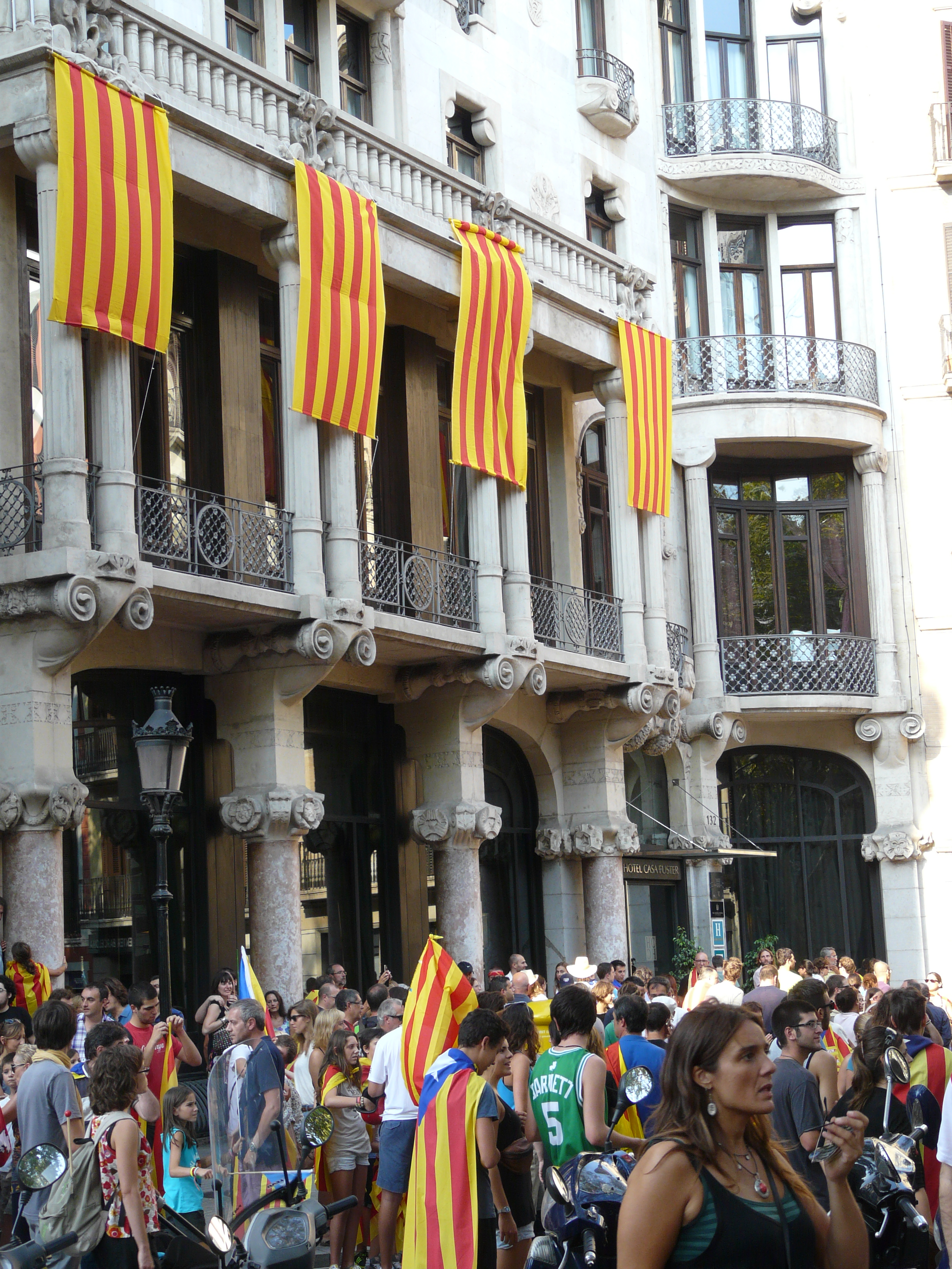 Casa Fuster (Barcelona) Object location41° 23′ 52.74″ N, 2° 09′ 29.33″ E